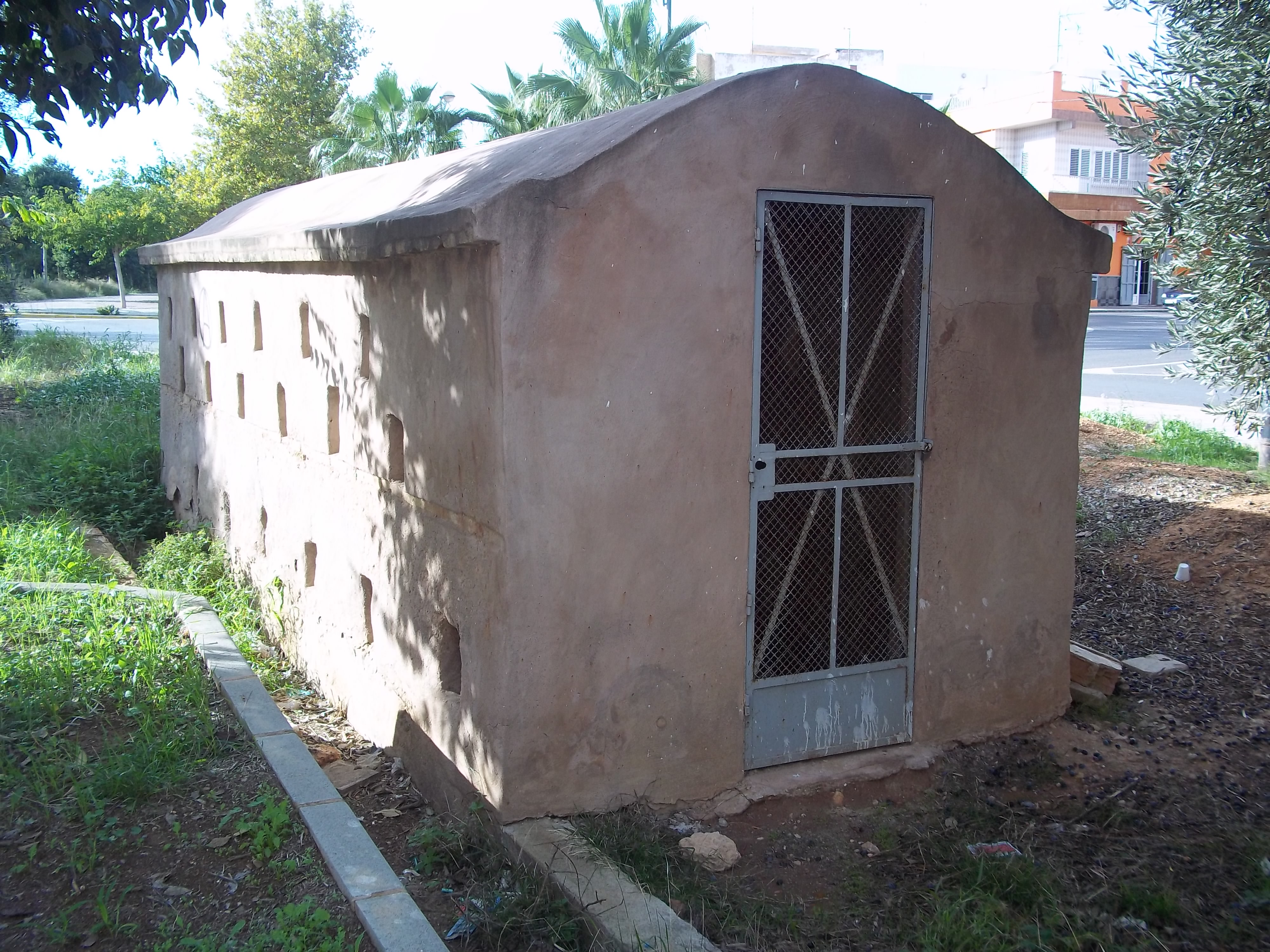 Cebera de maons a Les Coves o barri de la Magdalena de Massamagrell